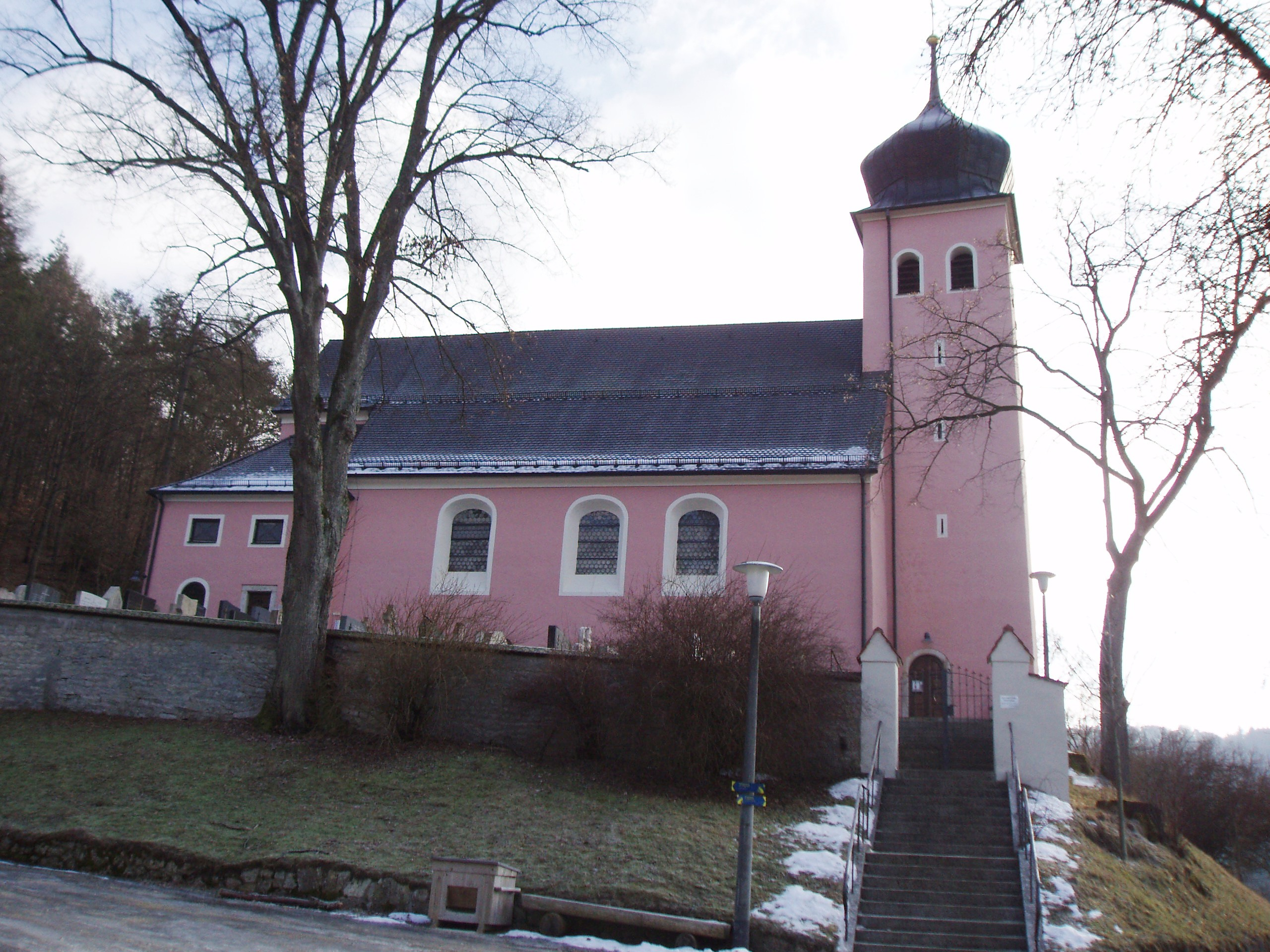 Erlingshofen Anlautertal, Landkreis Eichstätt, Kirche „Mariä Himmelfahrt“